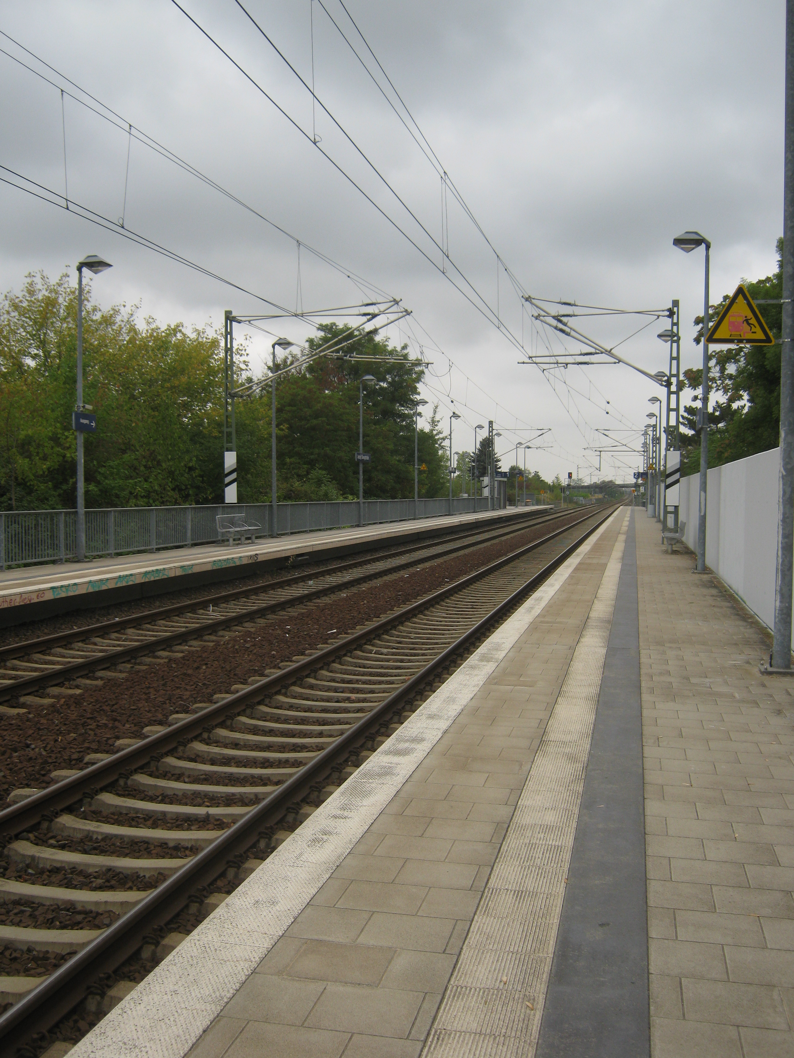 Blich auf den Haltepunkt Leipzig Slevogtstraße, einen Haltepunkt der S-Bahn Mitteldeutschland